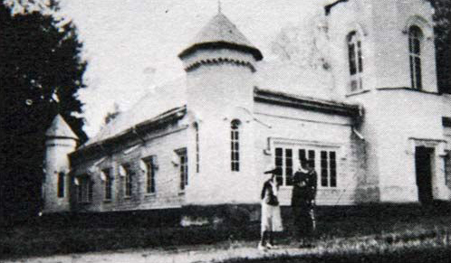 Беларуская (тарашкевіца): Вольна (Volna), сядзіба Сьлізьняў (Ślizień)